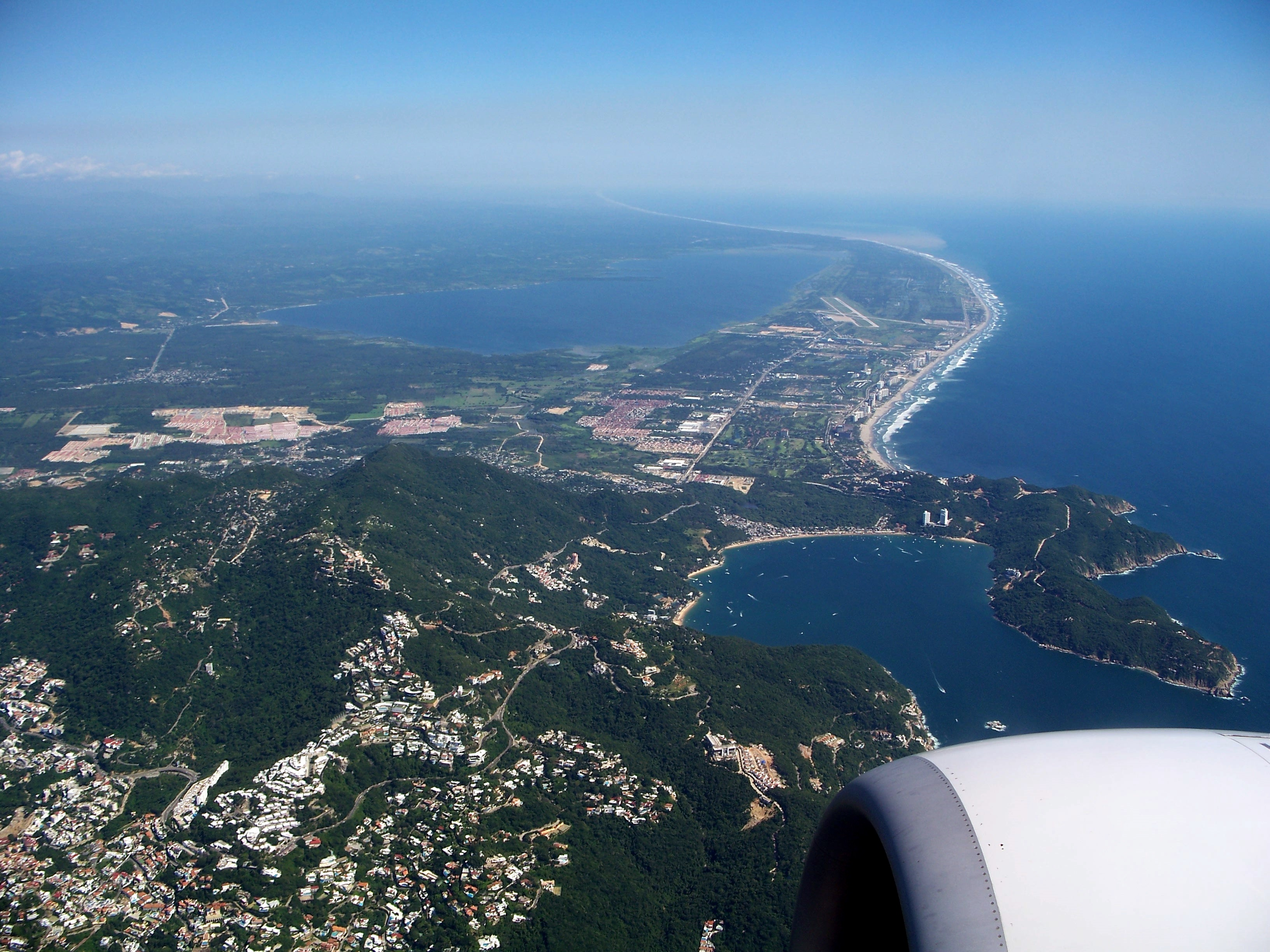 Vista aérea de la zona turística de Acapulco Diamante en Acapulco, Guerrero, México.